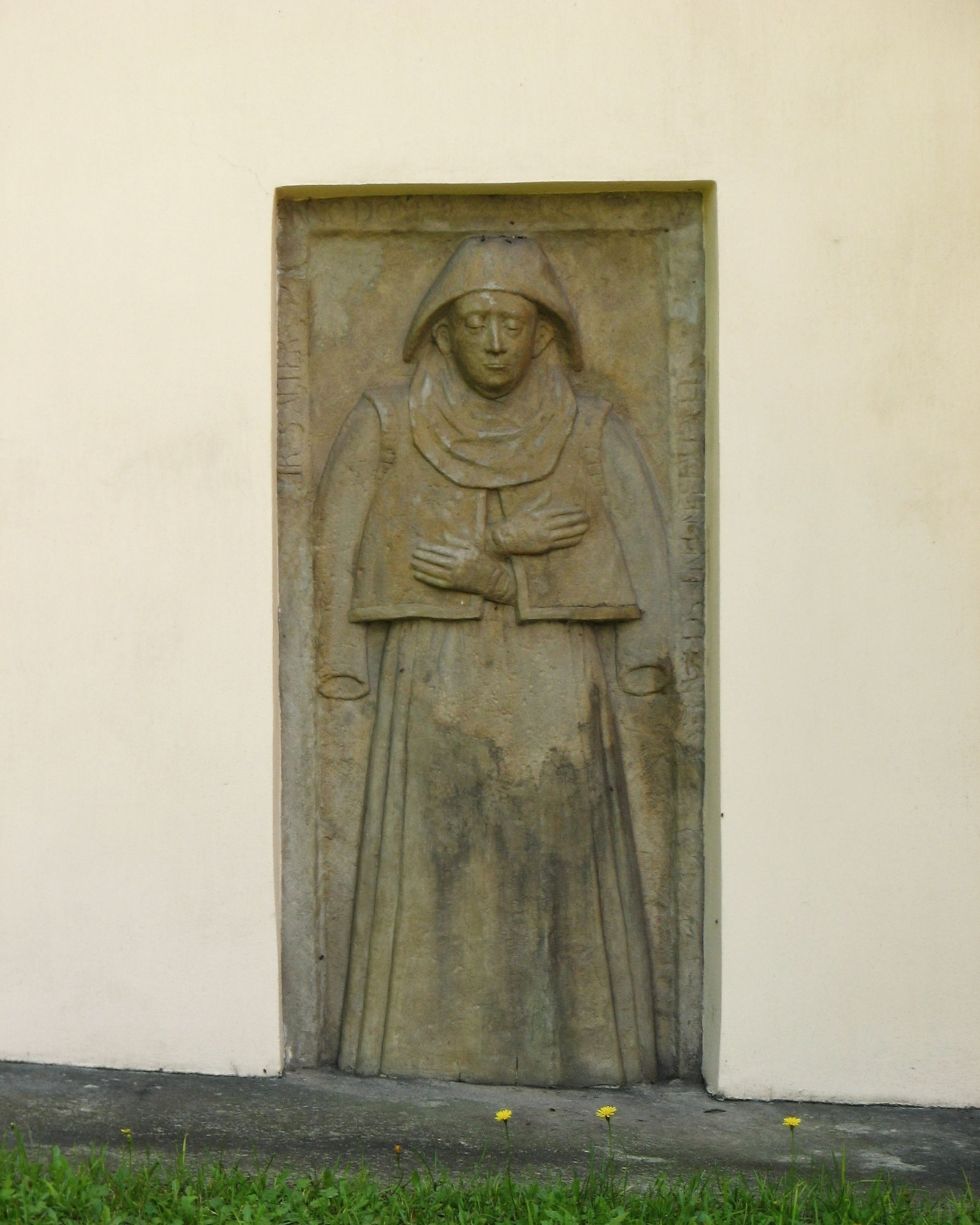 kamienna płyta nagrobna Teresy Liers z XVII wieku wmurowana w zewnętrzną ścianę kościoła Narodzenia św. Jana Chrzciciela w Lanckoronie